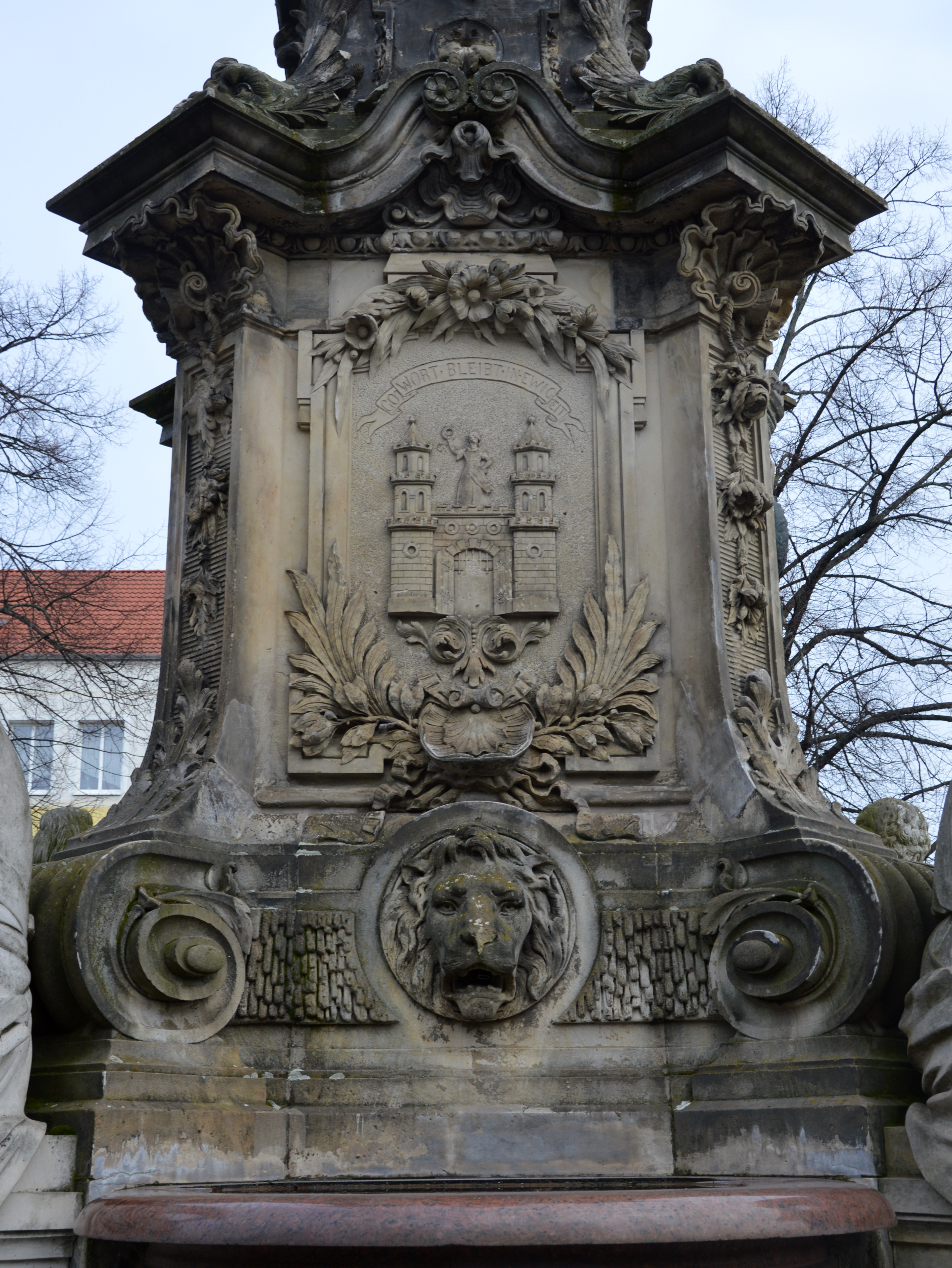 Hasselbachbrunnen